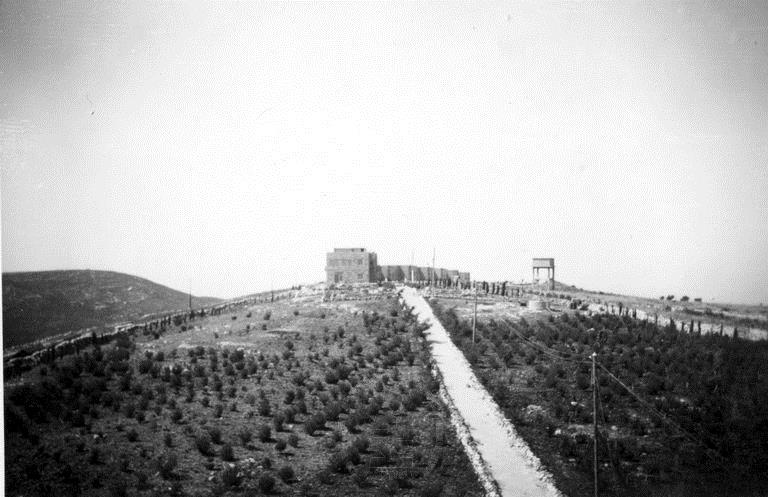 Sara Levi House